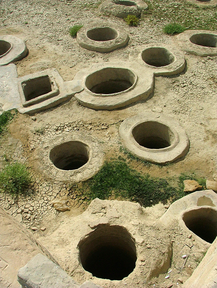 چاه‌های تلا در بندر لافت؛ جزیره قشم